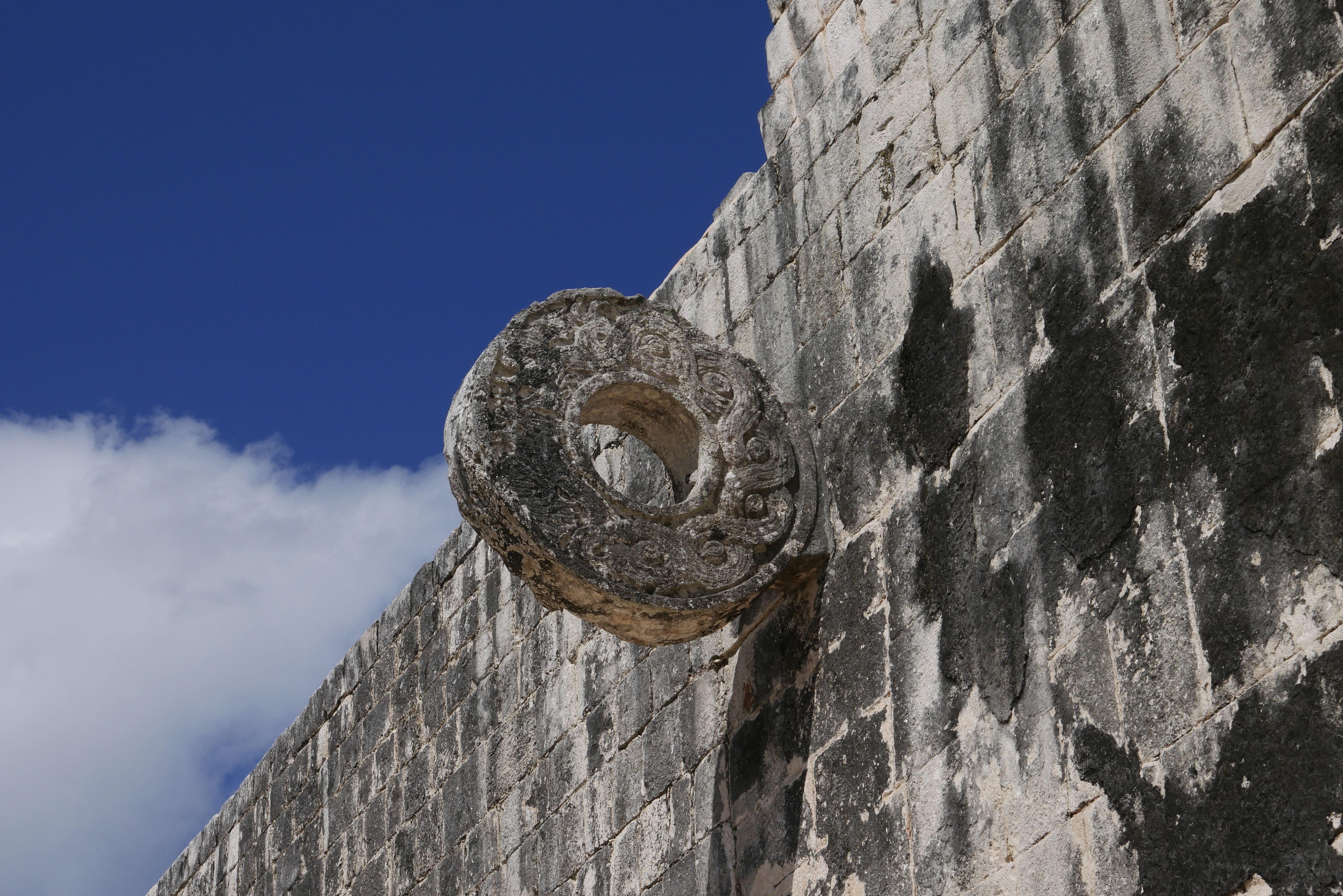 Diese Ringe dienten bei Sportveranstaltungen als Tore durch die der Ball hindurch geführt werden musste